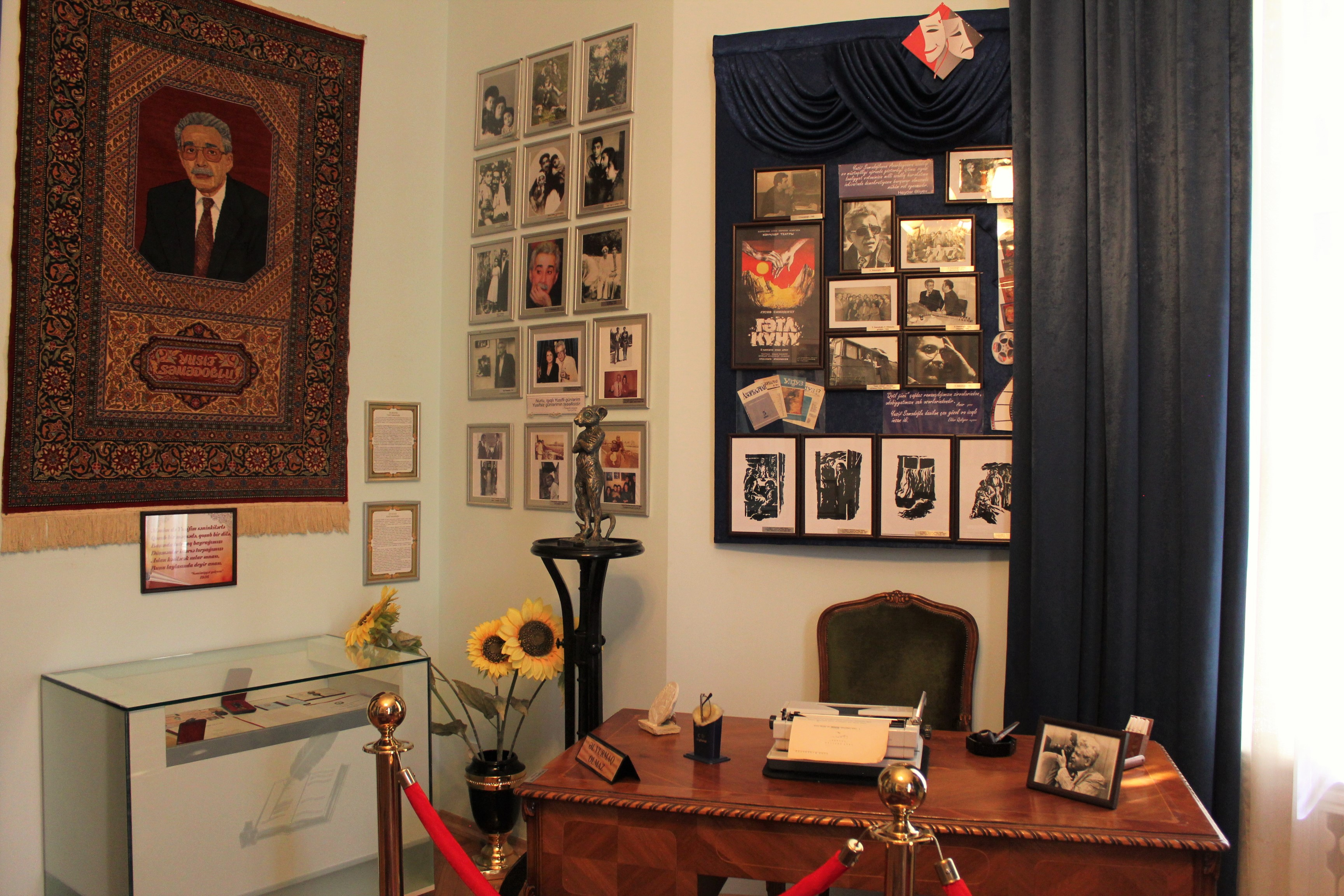 Экспозиционная комната дома-музея азербайджанского поэта Самед Вургуна. На данной фотографии отображаются экспонаты посвященные творчеству Юсифа Самедоглу.